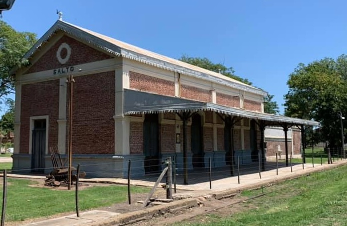 Estación Salto del Ferrocarril General Urquiza